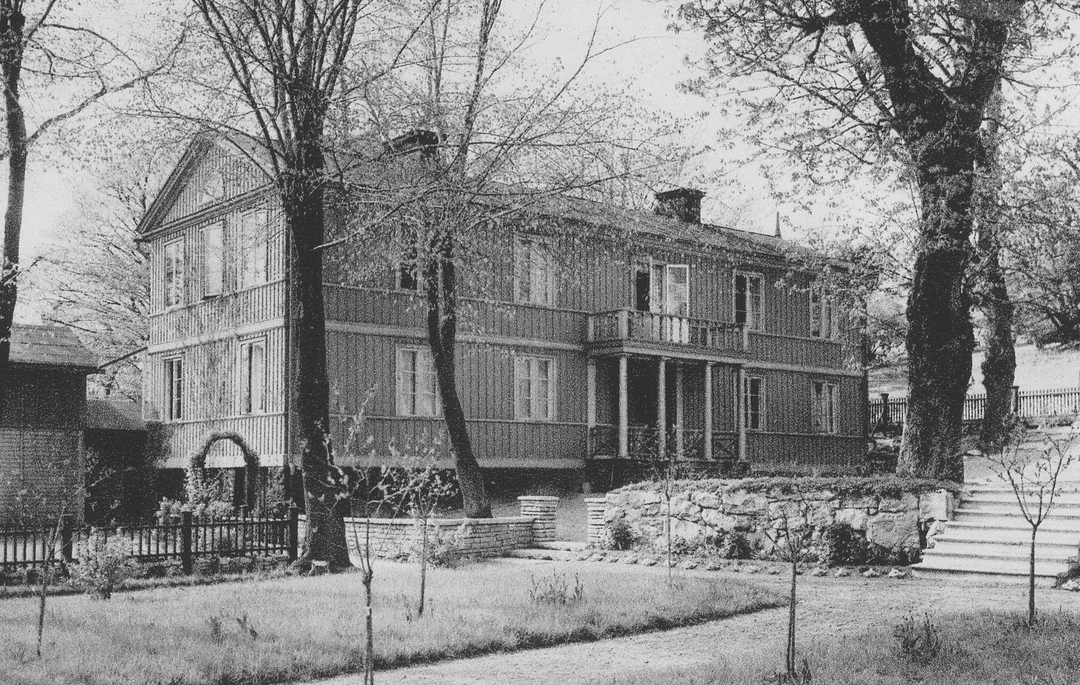 Djurgårdsvägen 142, "Sofiedal", f.d. Alberget 5B uppfördes ca 1830